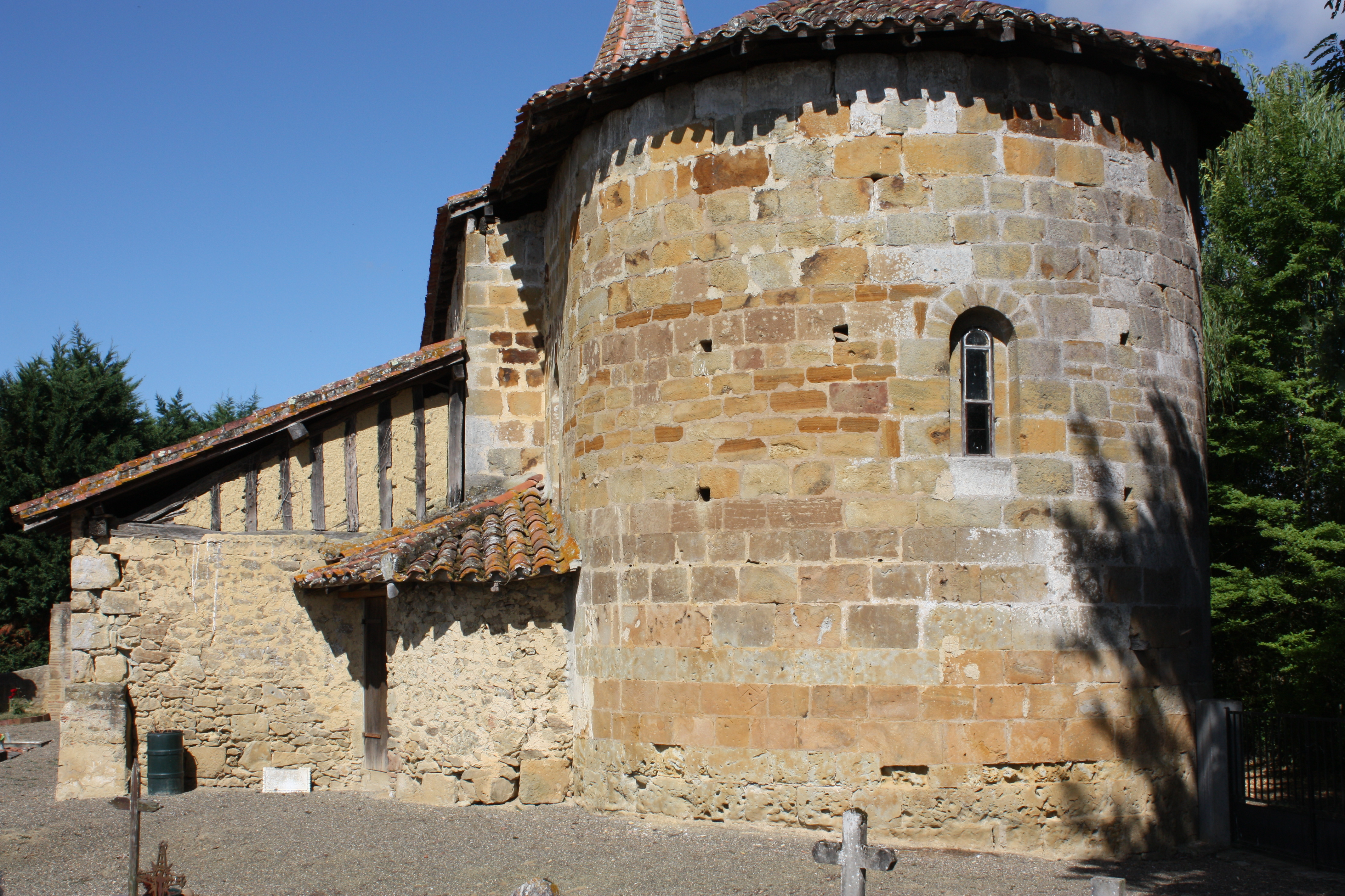 Fustérouau - Eglise Saint-Michel d'Asparens